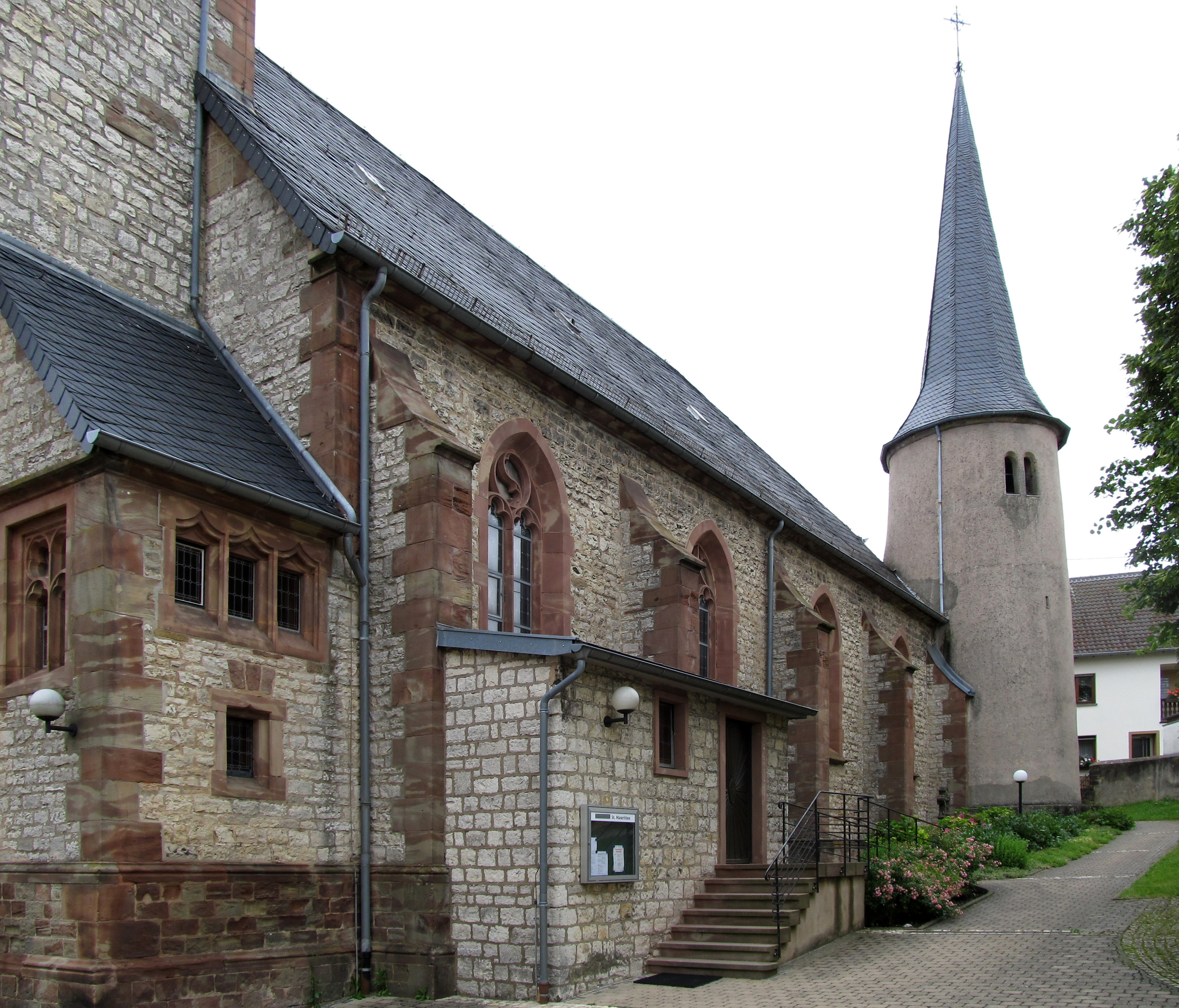 Seitenansicht mit sogenanntem "Römerturm" der katholischen Kirche St. Mauritius in Erfweiler-Ehlingen, Mandelbachtal, Saarland